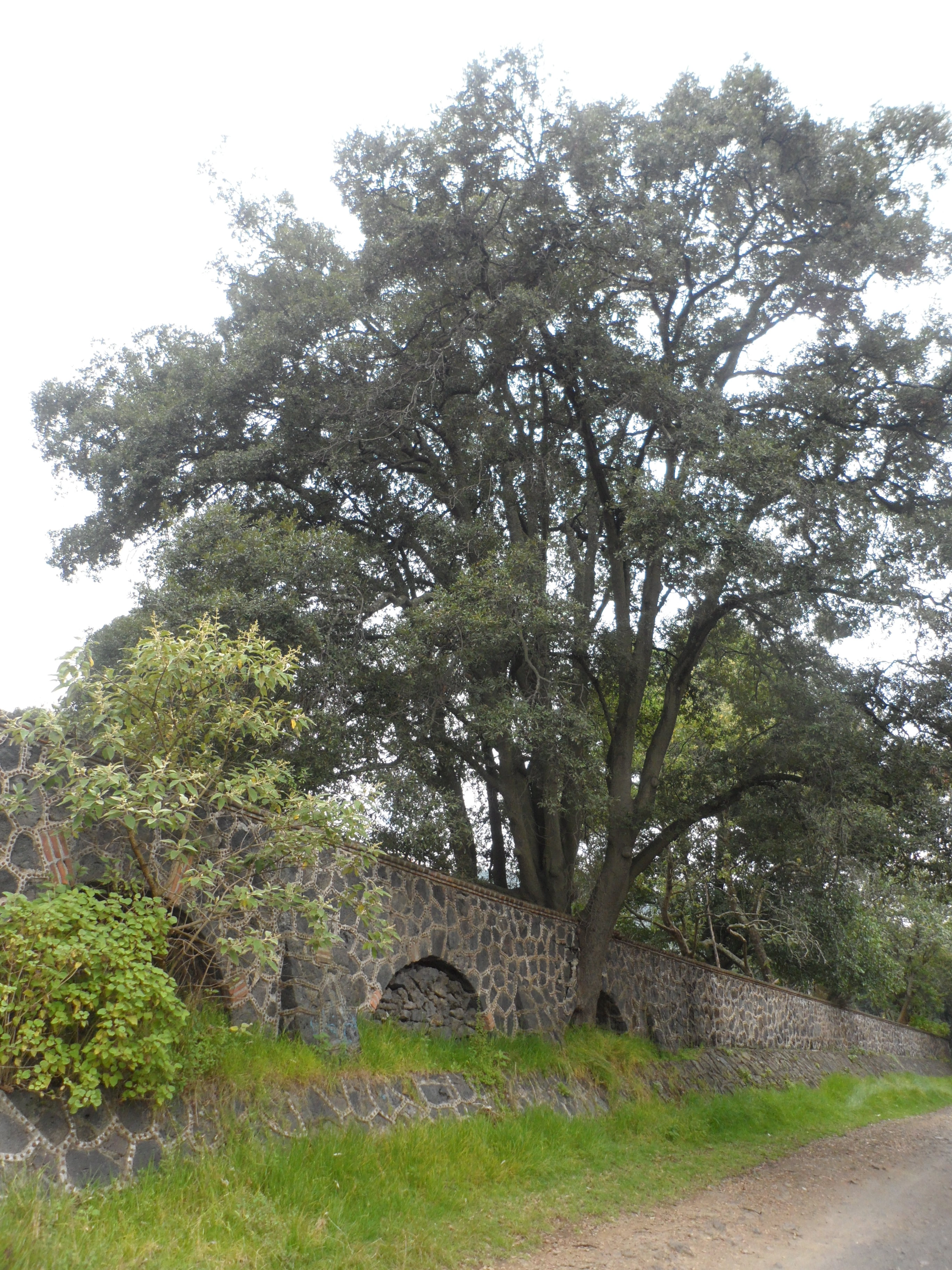 Árbol al lado de la barda periférica del Parque Ecológico de la Ciudad de México, delegación Tlalpan.